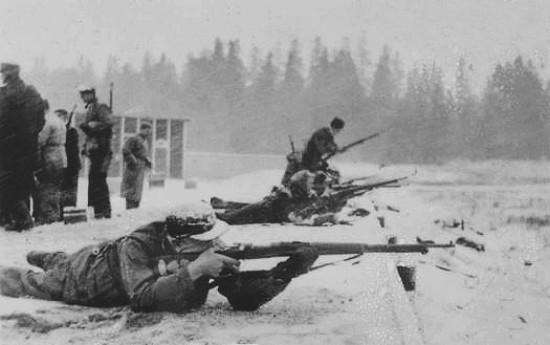 Gevärskytte på Söderskjutbanan 1943